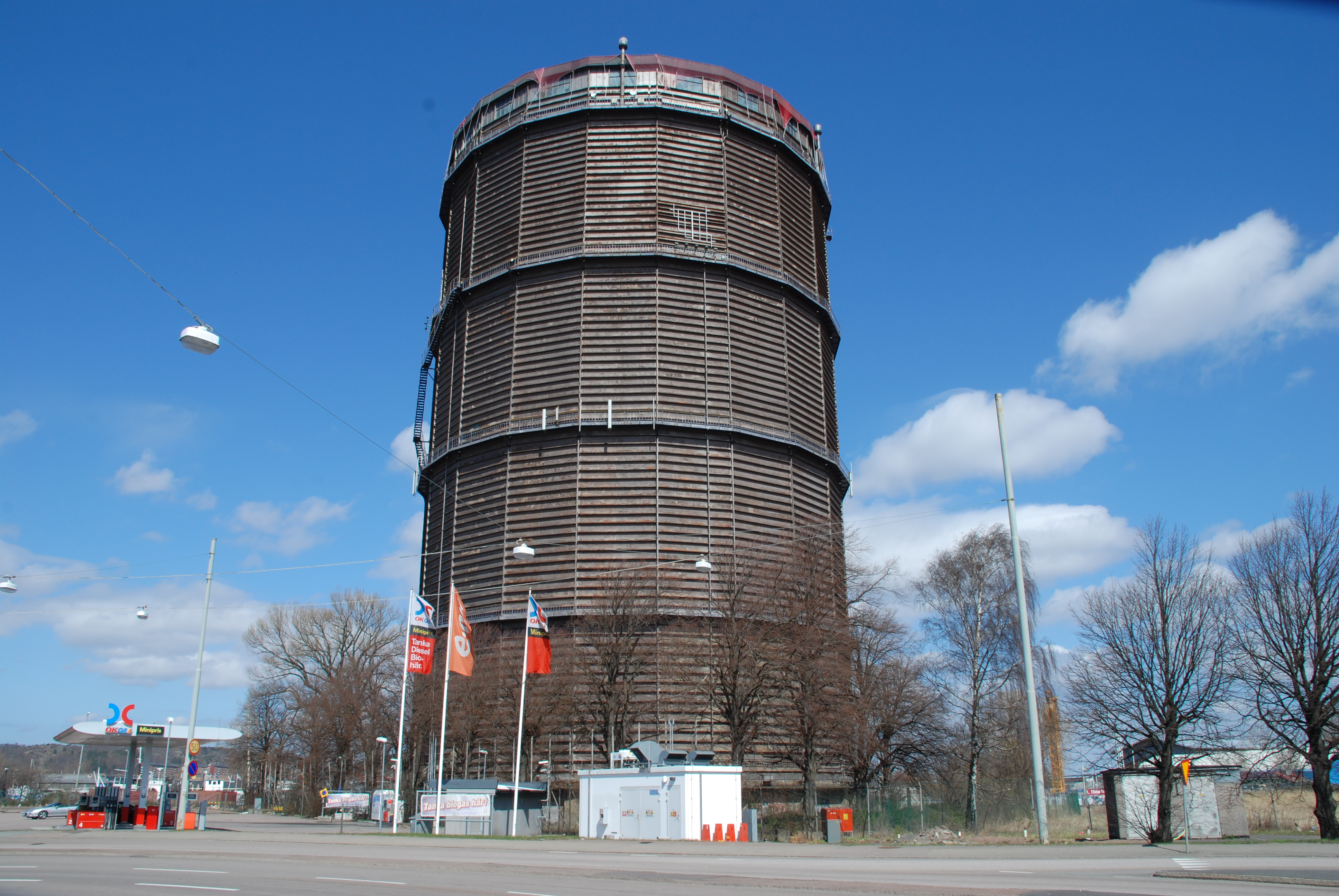 Gasklockan vid Falutorget i stadsdelen Gullbergsvass i Göteborg.